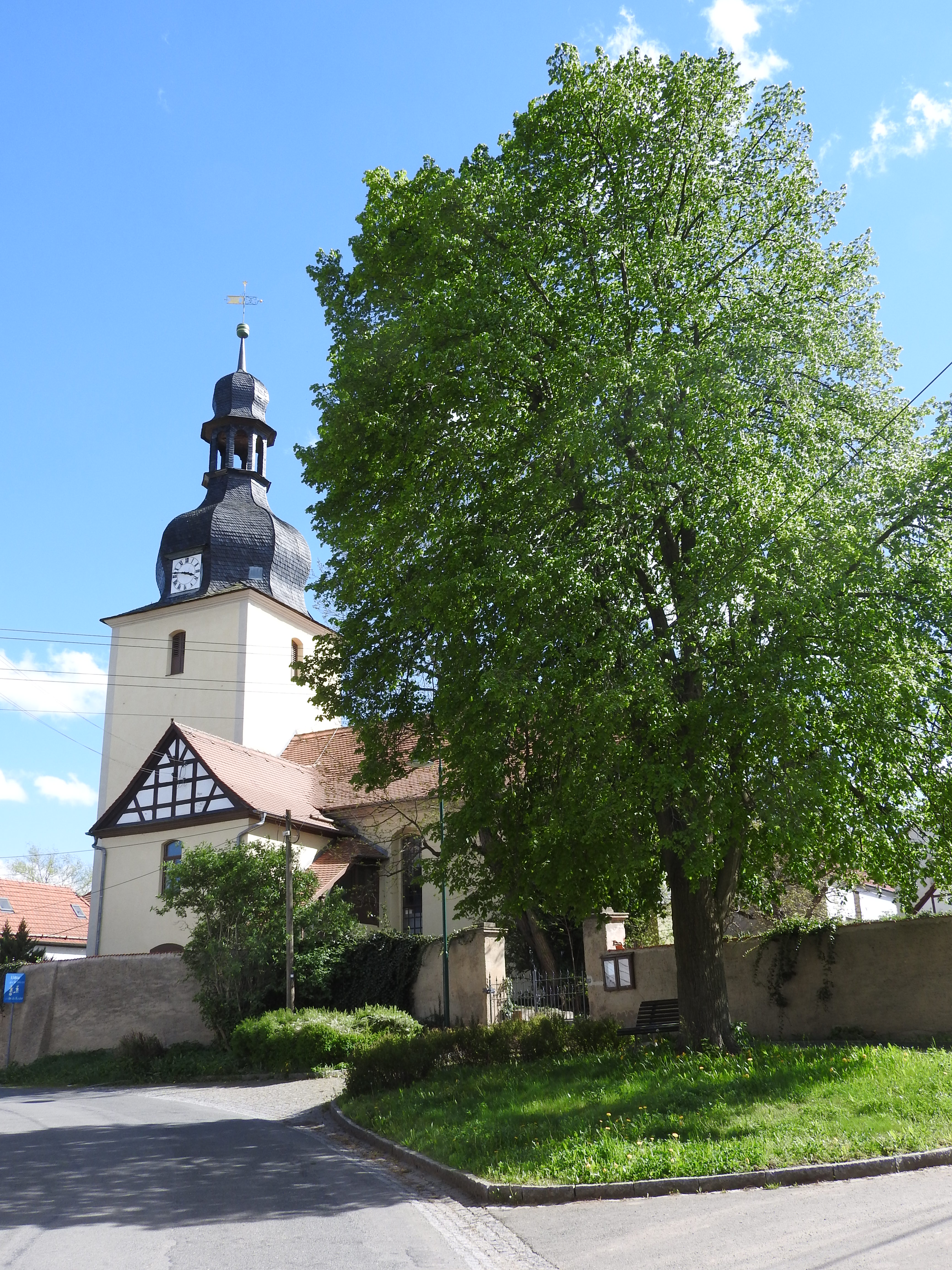 Kirche in Braunsdorf, Auma-Weidatal, Thüringen